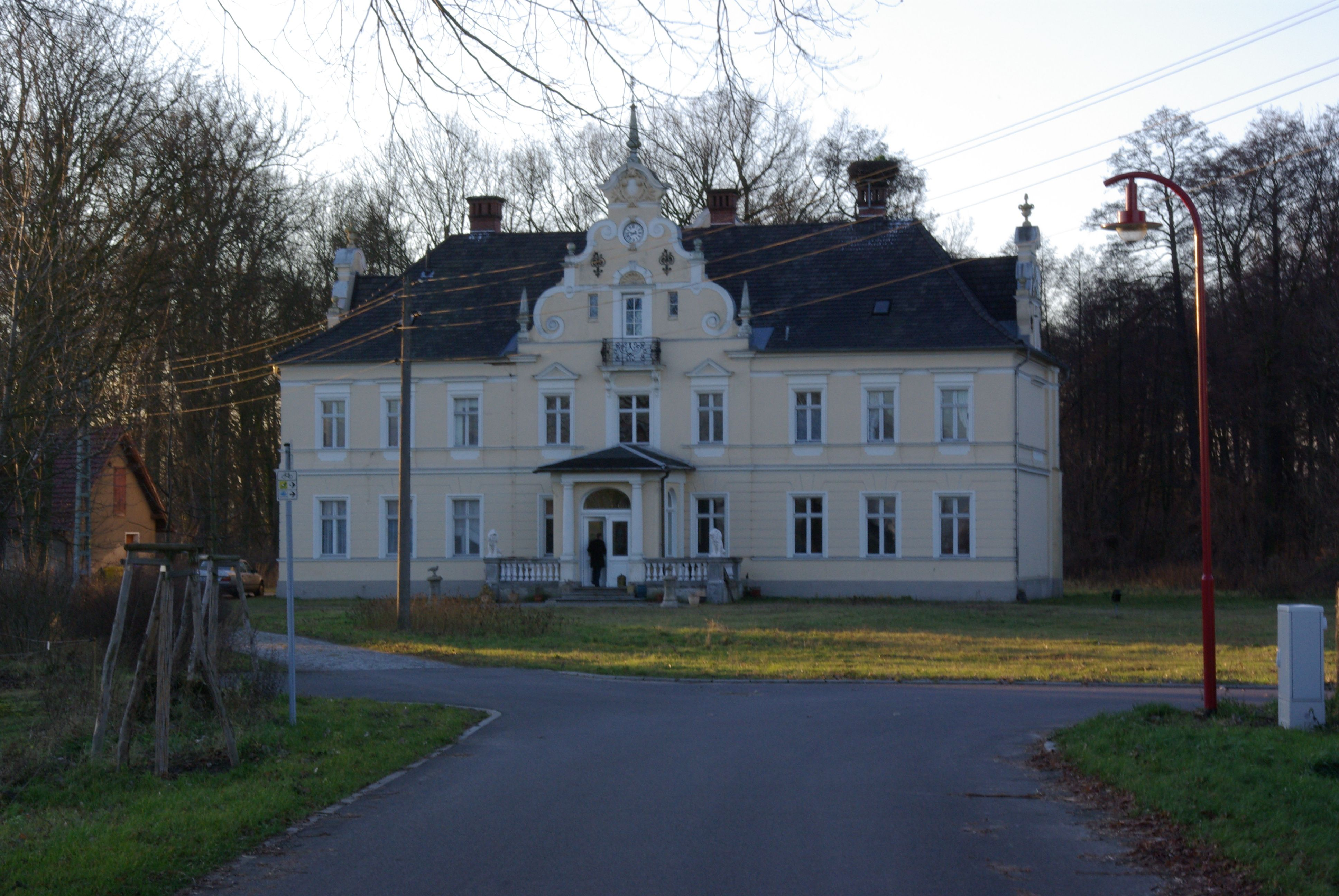 Rietzneuendorf-Staakow, Ortsteil Rietzneuendorf, Brandenburg, Deutschland, Schloss